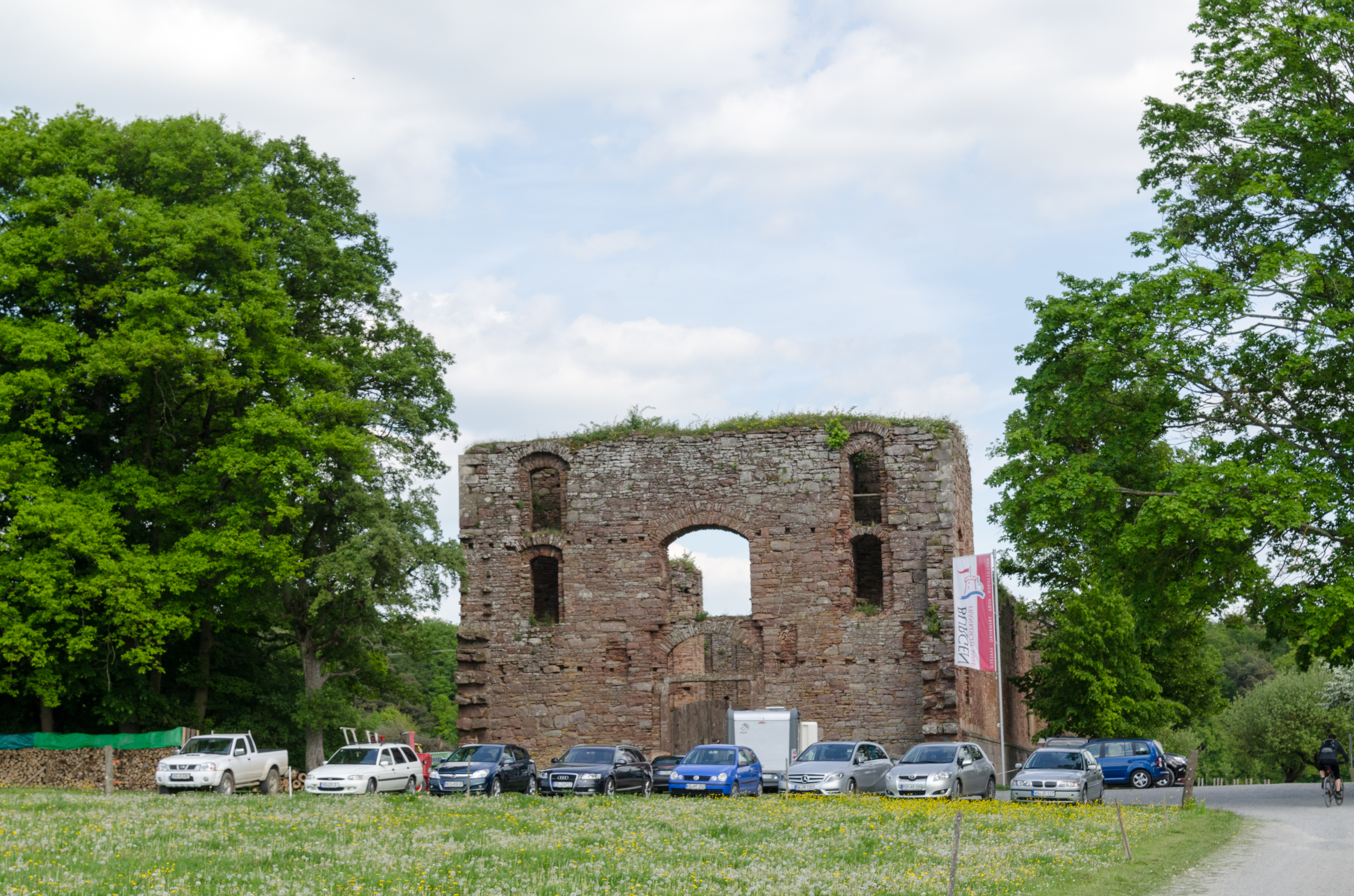 Aura an der Saale, Kirchenruine